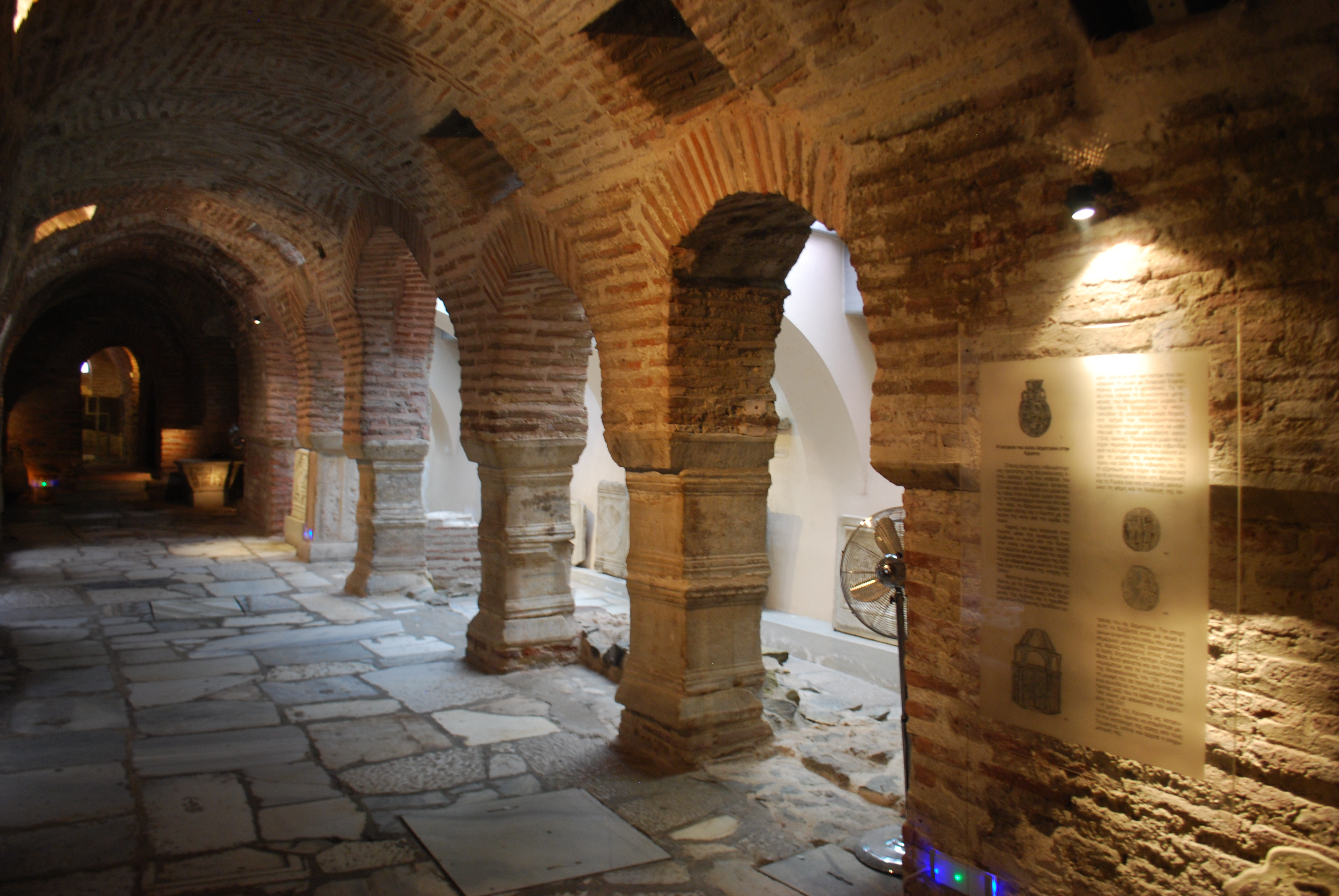 Vue de la crypte de l'église de Saint-Demetreios à Thessalonique.